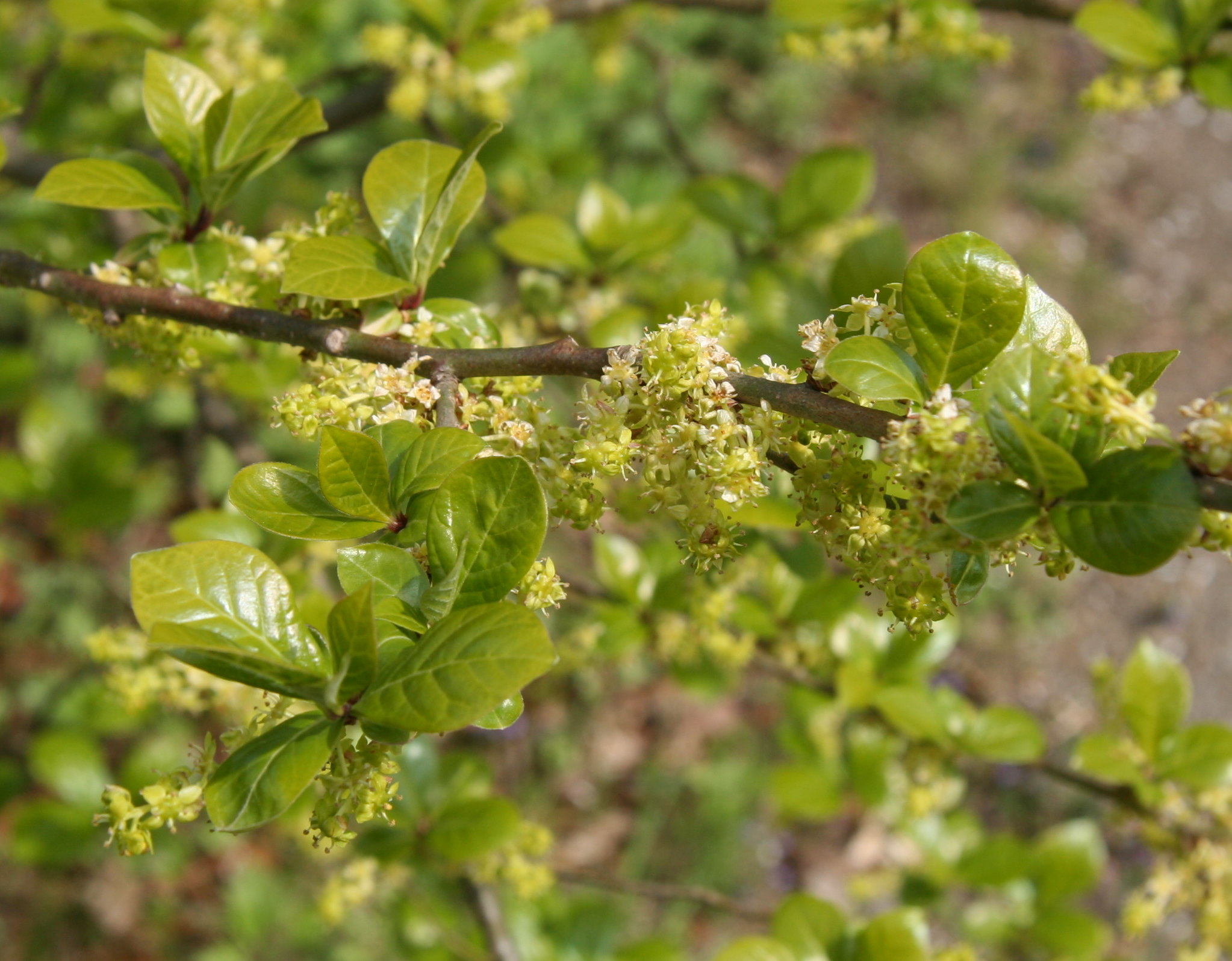 Orixa japonica im Botanischen Garten Dresden